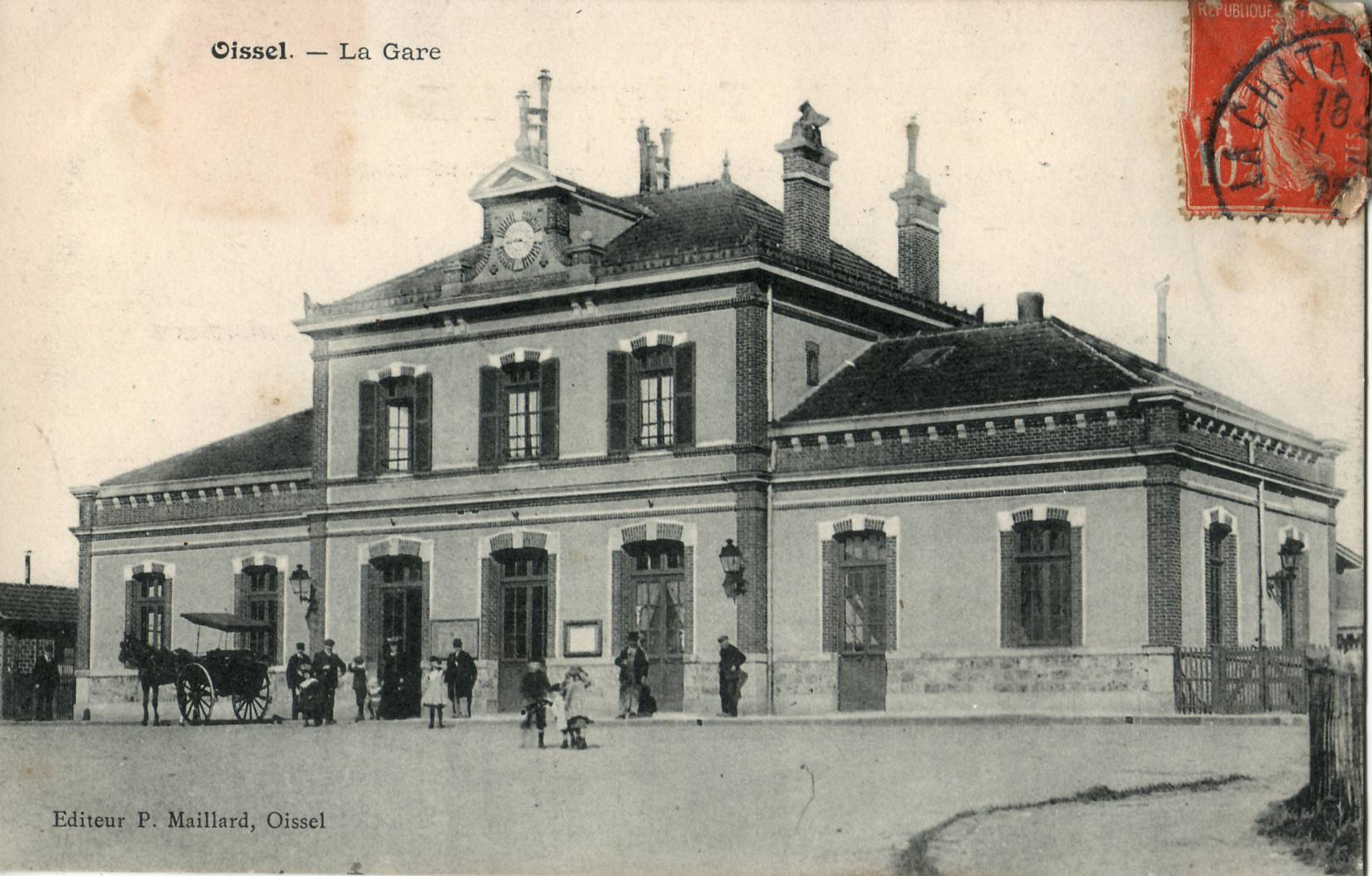 Cartepostale ancienne éditée par P. Maillard à Oissel : OISSEL - La Gare